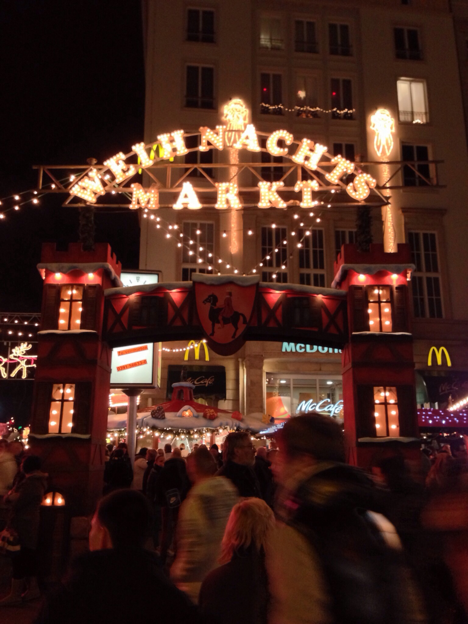 Eingang zum Magdeburger Weihnachtsmarkt Ecke Ernst-Reuter-Allee / Breiter Weg